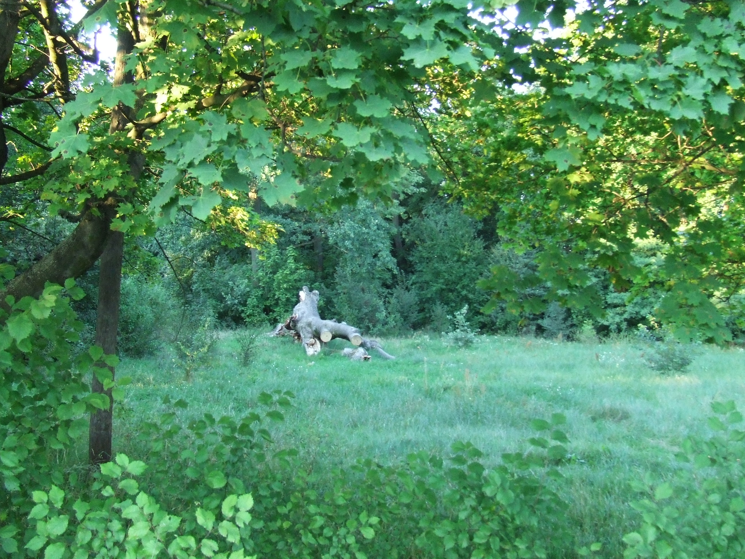 Pozostałości parku dworskiego z XVIII/XIX w. w Celejowie 05.1976.